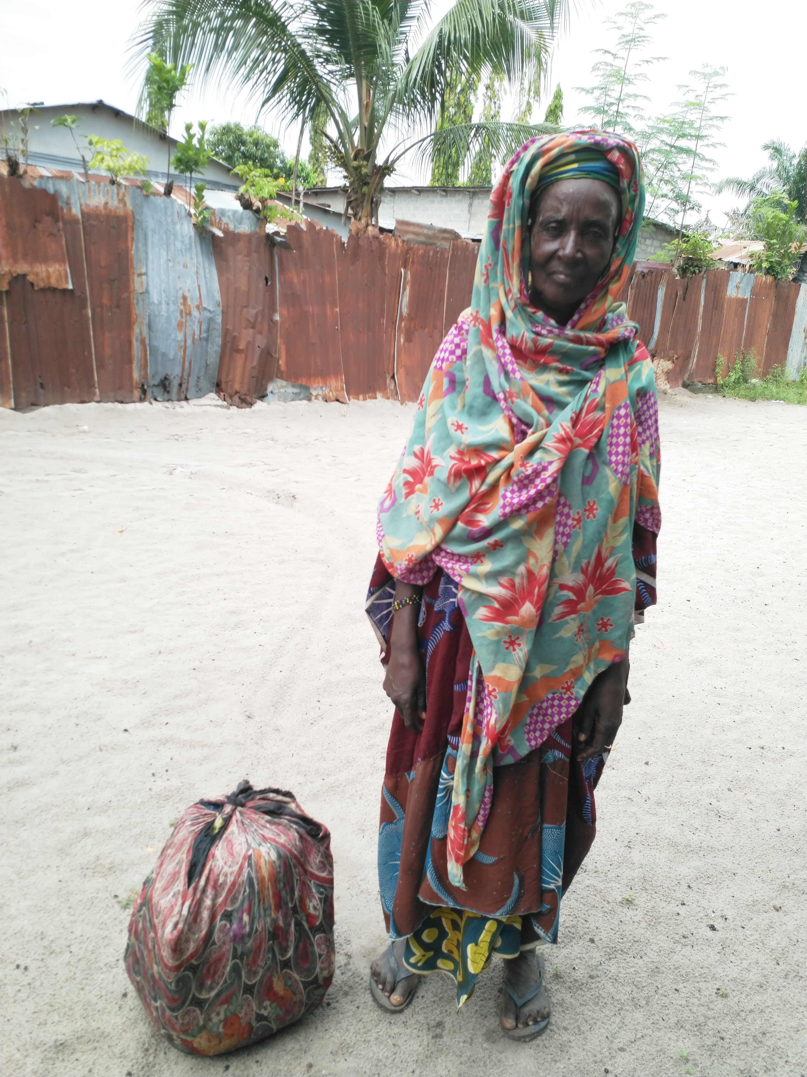 Appelées kaba kaba, ces marchandes de potions magiques et de remèdes contre différentes maladies viennent du Niger et du Nord Bénin. Elles arrivent au Sud pour proposer leur potions. Il est dit qu'ils ont des pouvoirs de disparaître et de se retrouver ailleurs. This is an image of "African people at work" from Benin